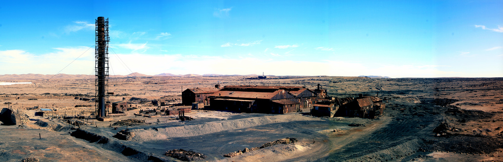 oficina salitrera de Humberstone, abandonada en la actualidad, ubicadas en la comuna de Pozo Almonte, I Región de Tarapacá, en Chile.